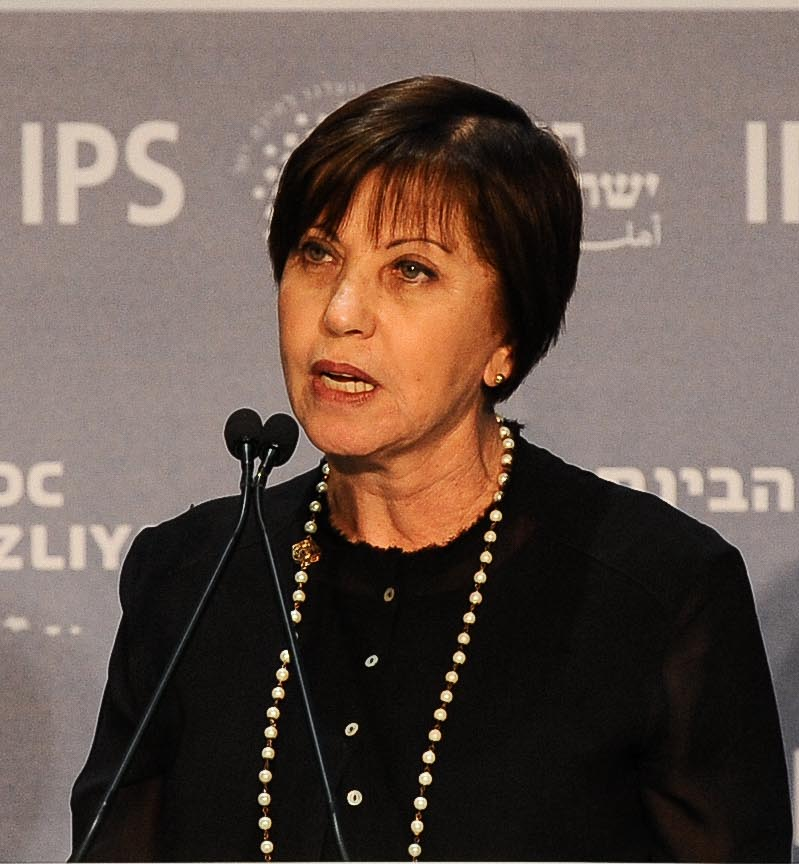 זהבה גלאון בכנס הרצליה 2016 בבית הנשיא